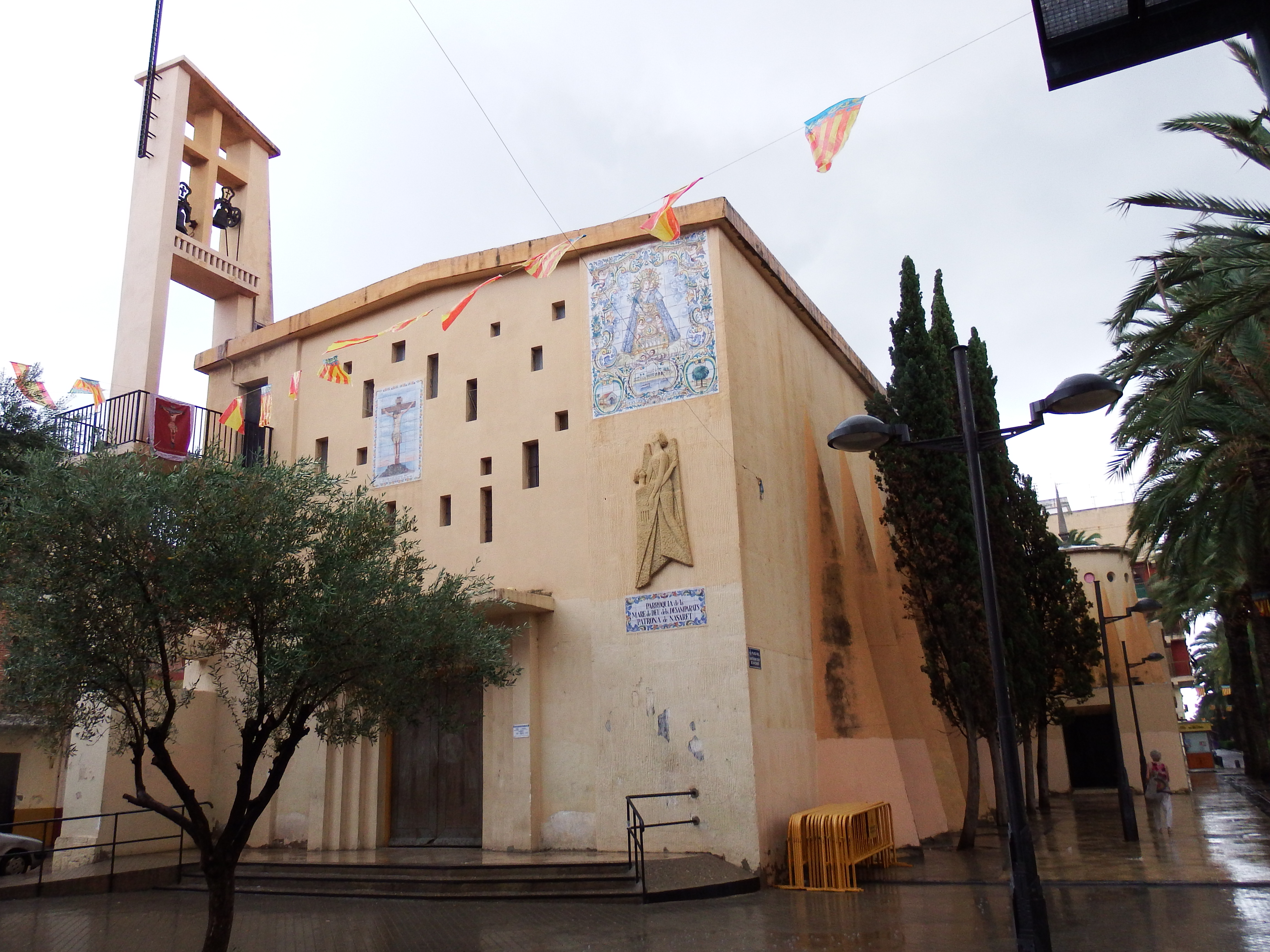 Exterior de la Iglesia Virgen de los Desamparados de Nazaret, Valencia.